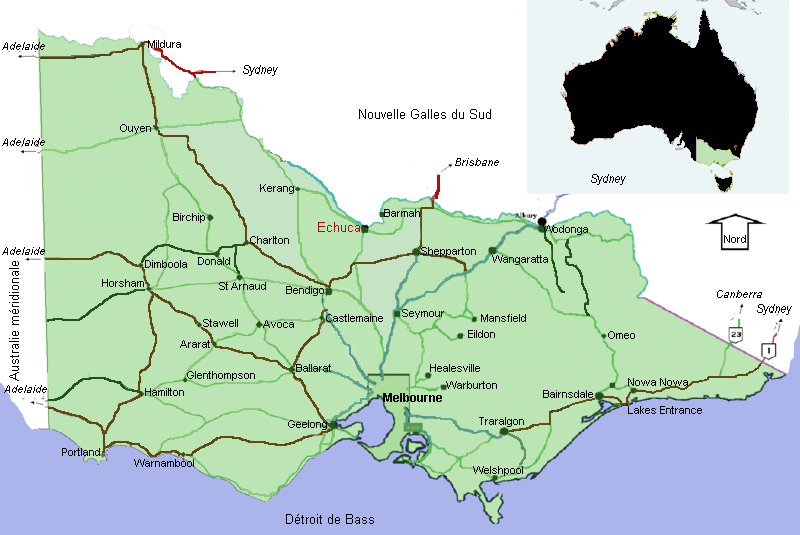 Carte d'Echuca, auVictoria, en Australie